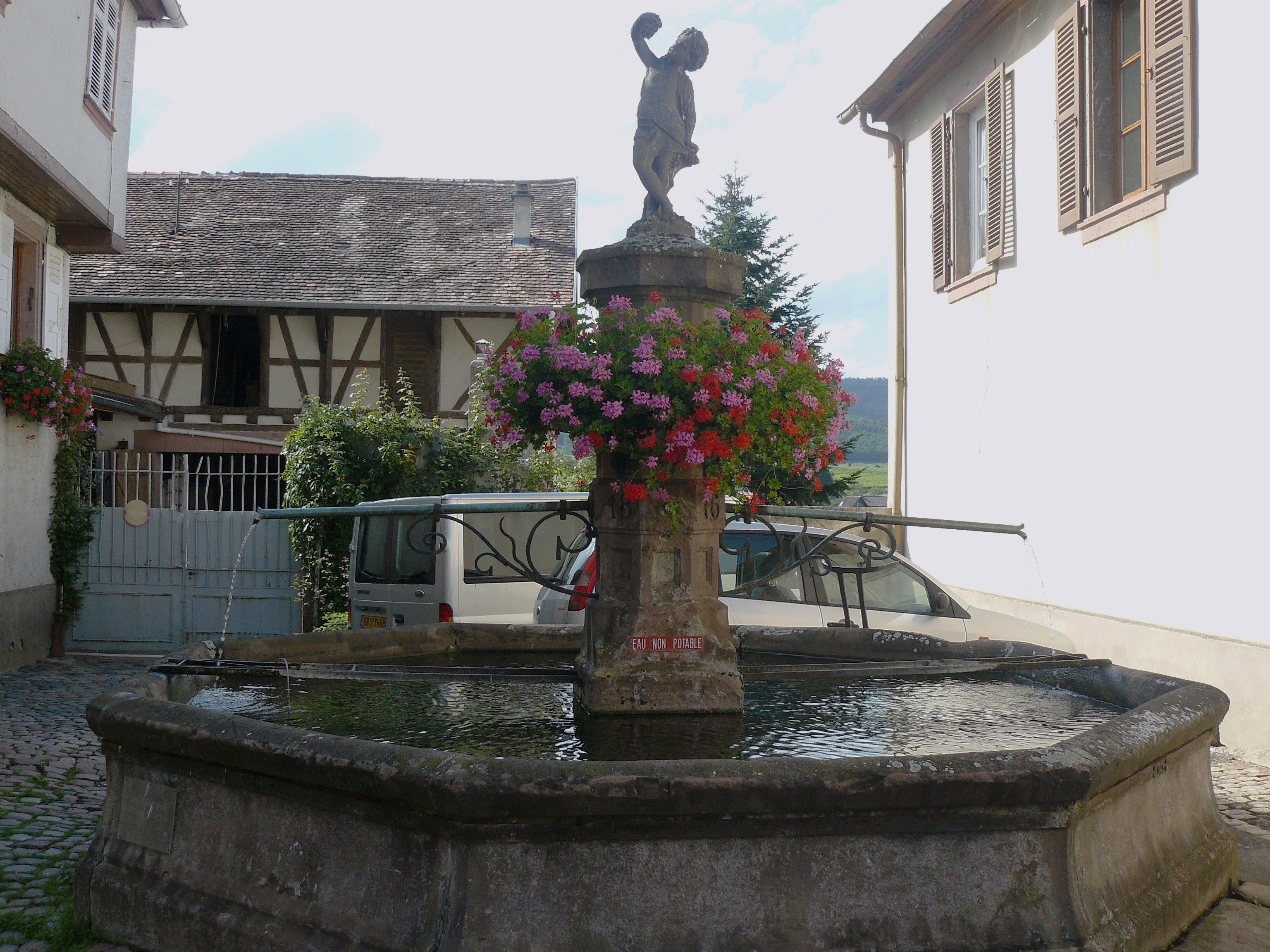 Ancienne fontaine du XIIIe siècle, la plus vieille du village. La date gravée 1876 est la date d'une refection.